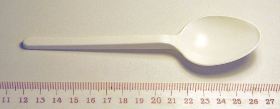 Plasta kulero por unufoja uzado. Sed reale ĝi taŭgas kaj vere ofte estas uzata multfoje. Mi, aŭtoro de la bildo, permesas al ĉiuj uzi ĝin kun ĉi tiaj kondiĉoj